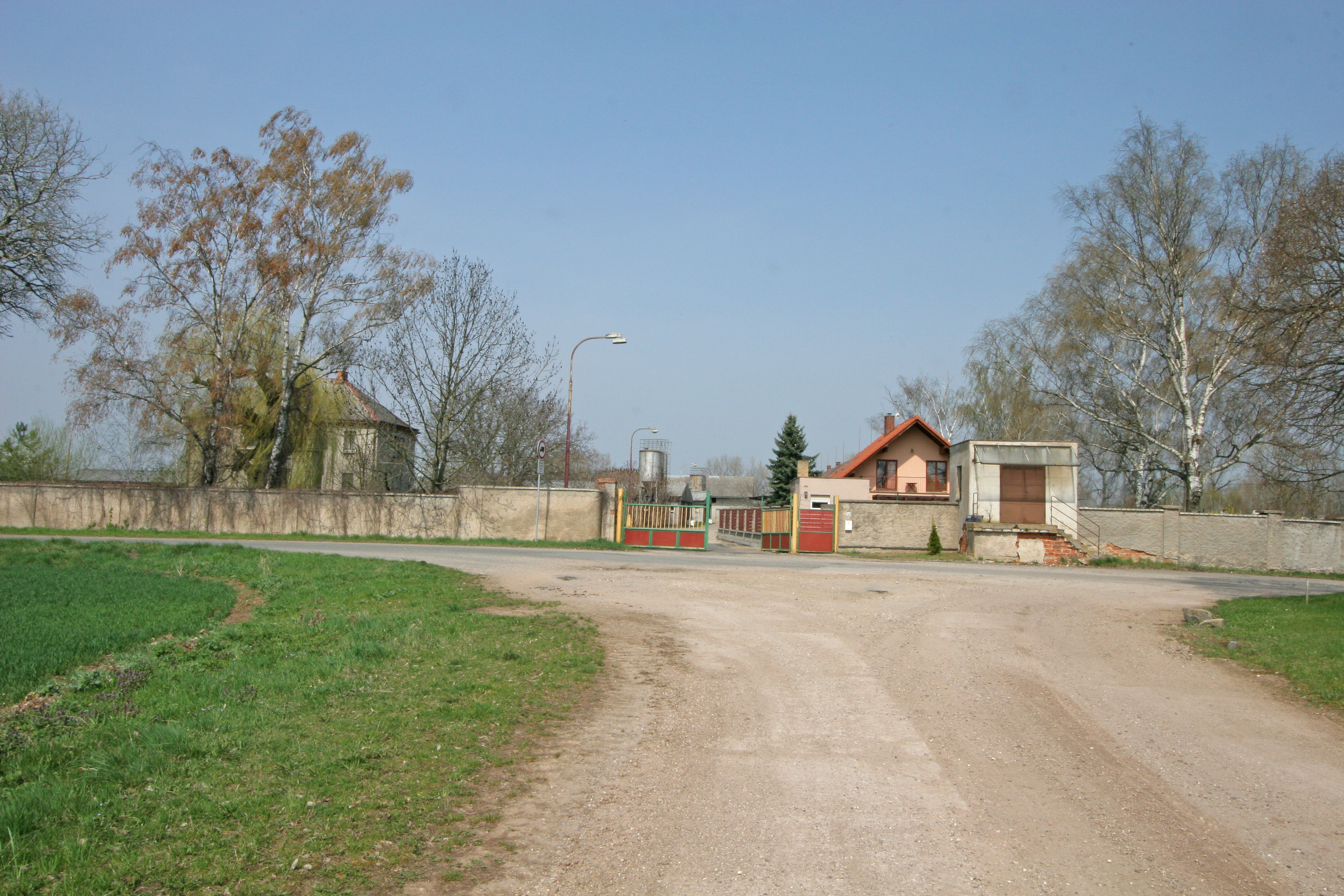 Třesice farma čp. 22